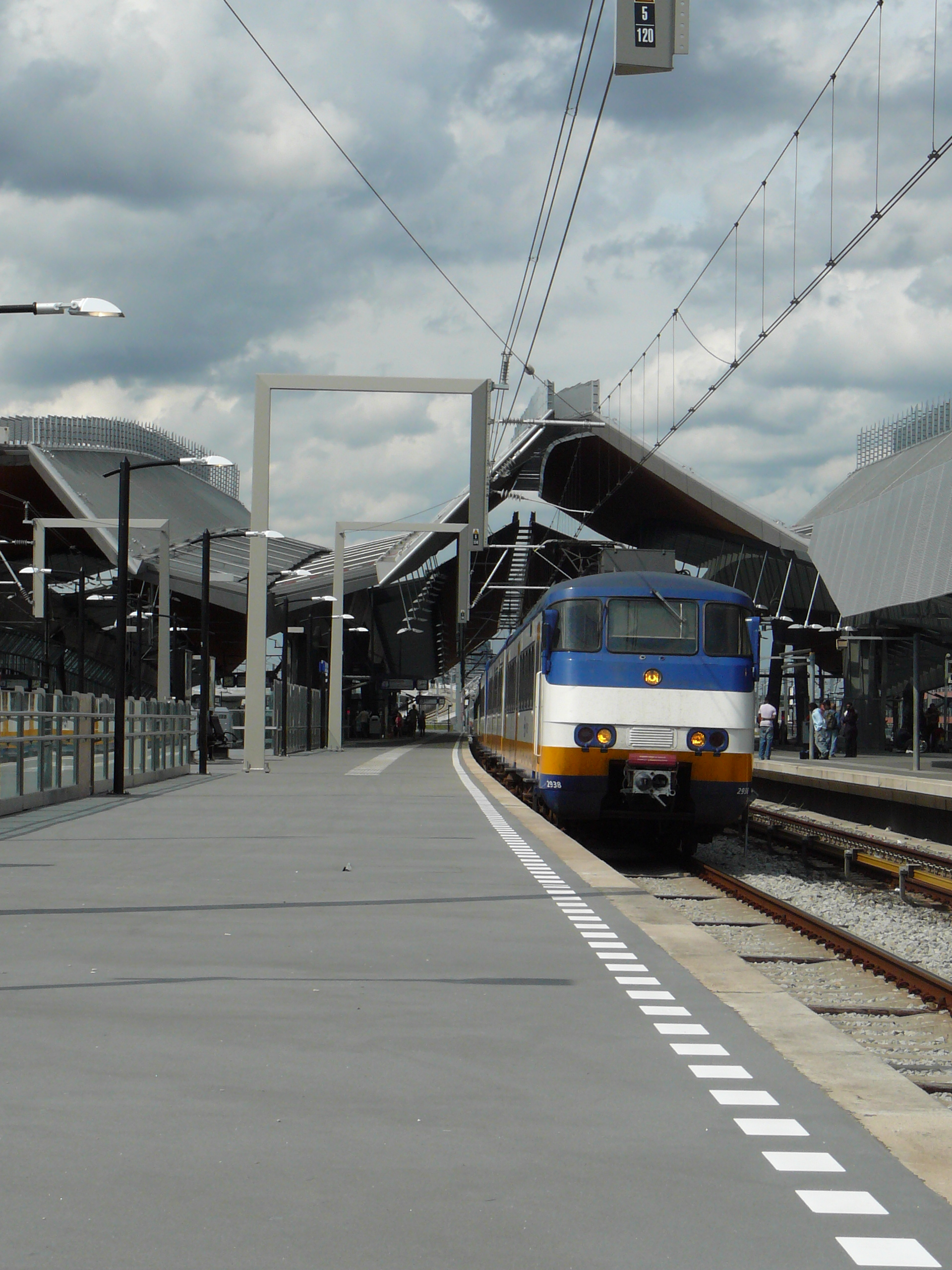 2938+2978 Alkmaar - Rotterdam Centraal, Amsterdam Bijlmer ArenA, 19.08.2007